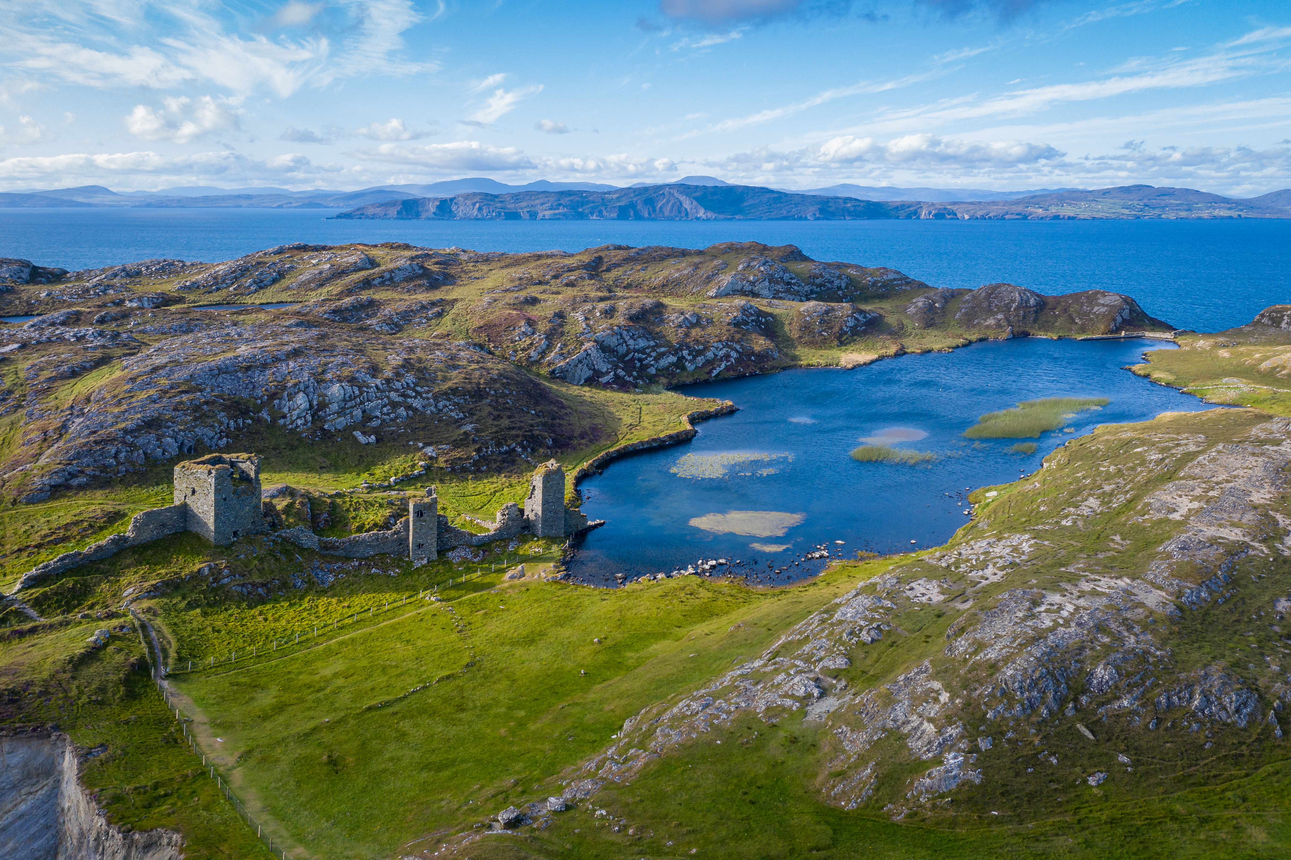 Dunlough Castle, Luftaufnahme